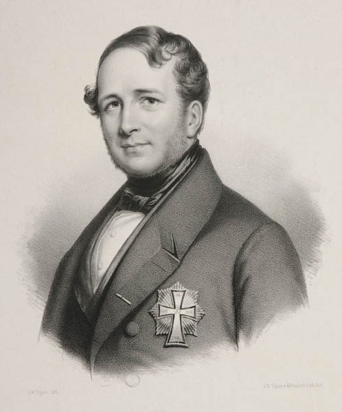 Lithographie v. Christian Høyer Bille (1799-1853), Dänischer Diplomat, u.a. dänischer Gesandter in Hamburg